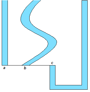 hydrostatisce paradox zelf, autocad+paint MADe 15 aug 2005 18:47 (CEST)